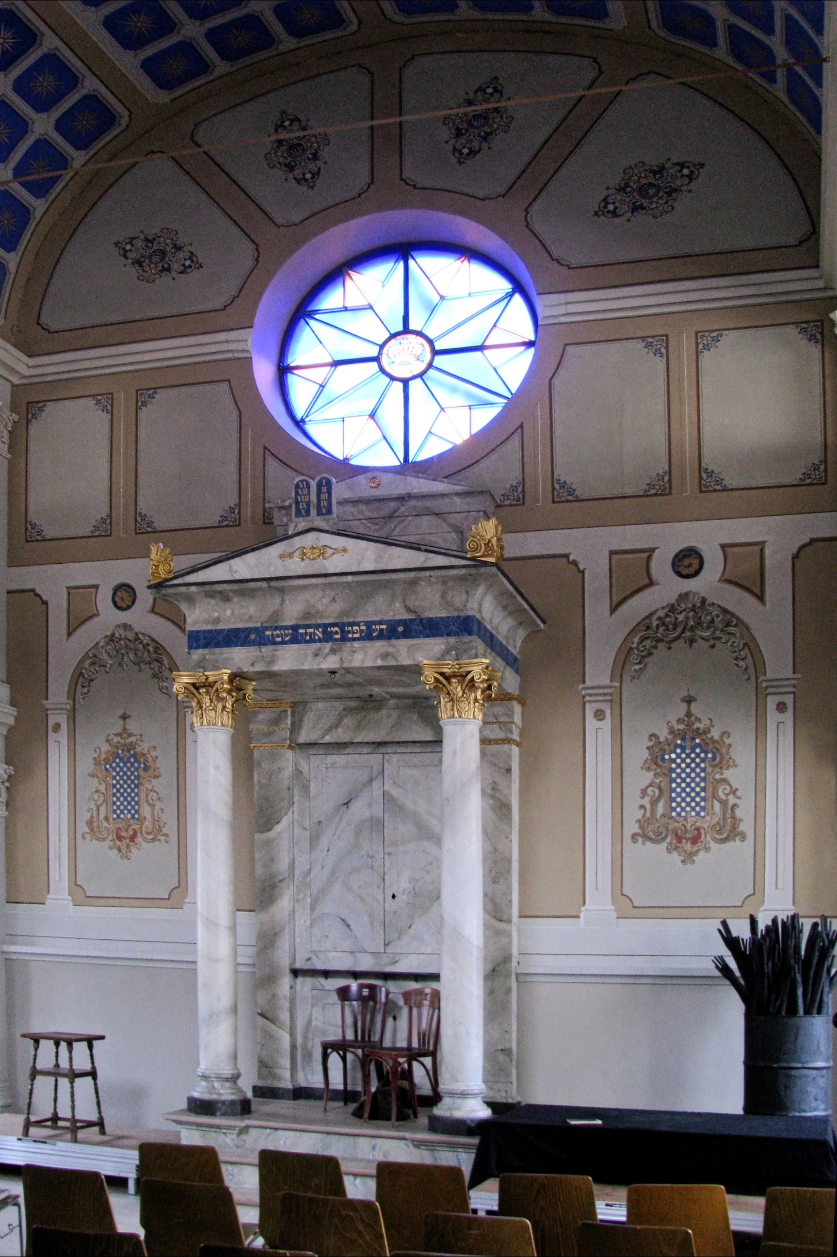 Innenansicht der Synagoge Sulzburg